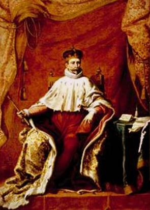 Dipinto del doge Giovanni Francesco Brignole (1635-1637)